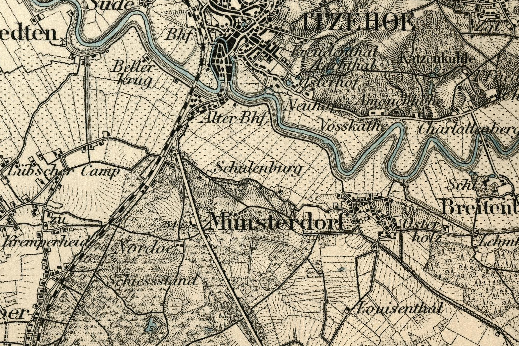 Karte des Deutschen Reiches von 1893, Itzehoe